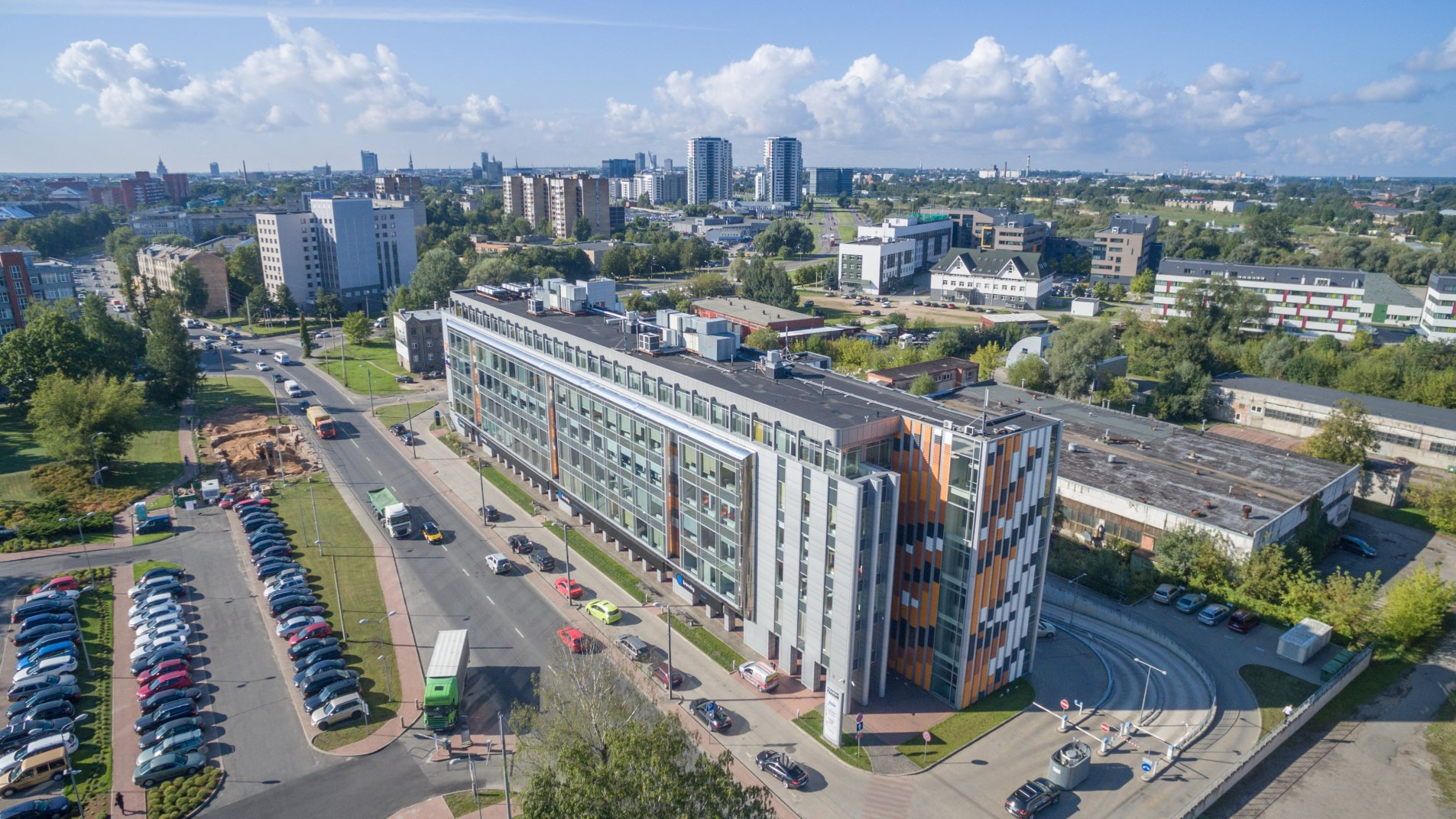 Duntes nami